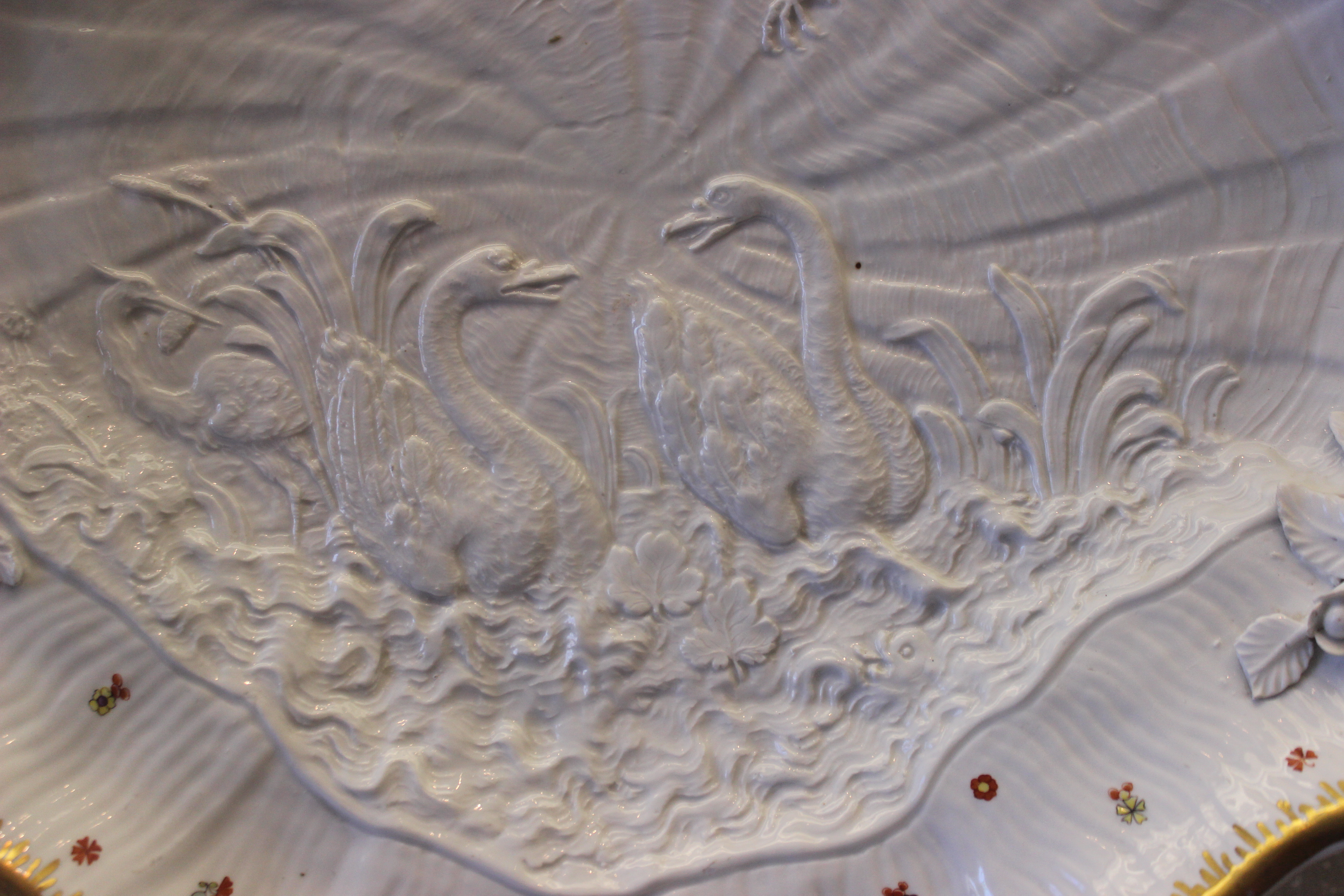 Fuente del Servicio del Cisne. Johann Joachim Kaendler. Philadelphia Museum of Art.